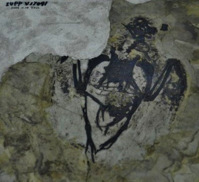 Fossil of Archaeorhynchus, an extinct bird- Picture at Bejing Museum of Natural History